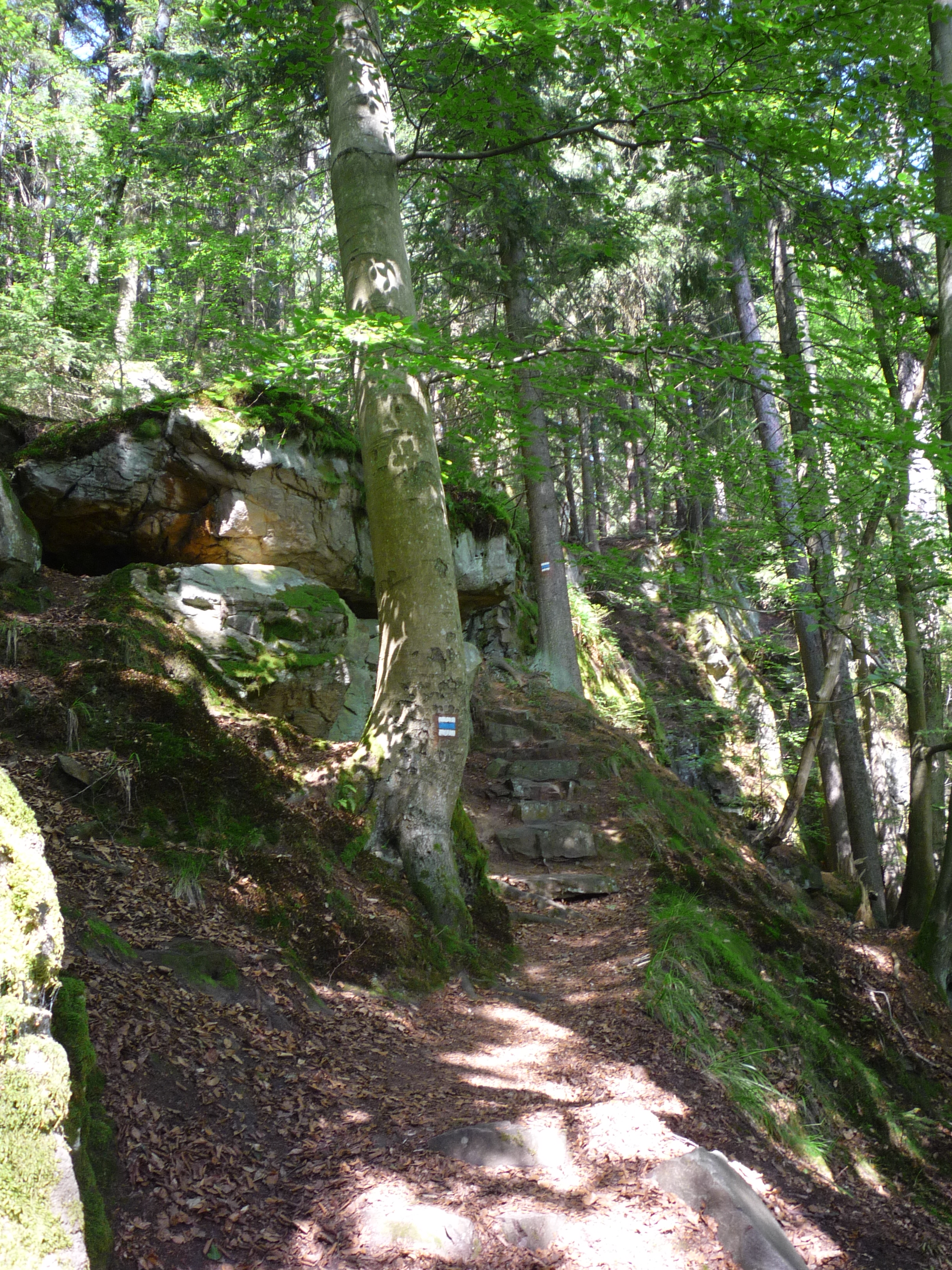 Autor fotografie Jiří Zelenka. Čertův stolek. Skála nad údolím naučné stezky Doubrava a cesta na vrcholek. Tudy asi chodil poustevník do Chotěboře podle pověsti. Trasa CH.K.O. Údolí Doubravy. Bílek - Chotěboř. Město Chotěboř .Okr. Havlíčkův Brod. Kraj Vysočina. Czech Republik.